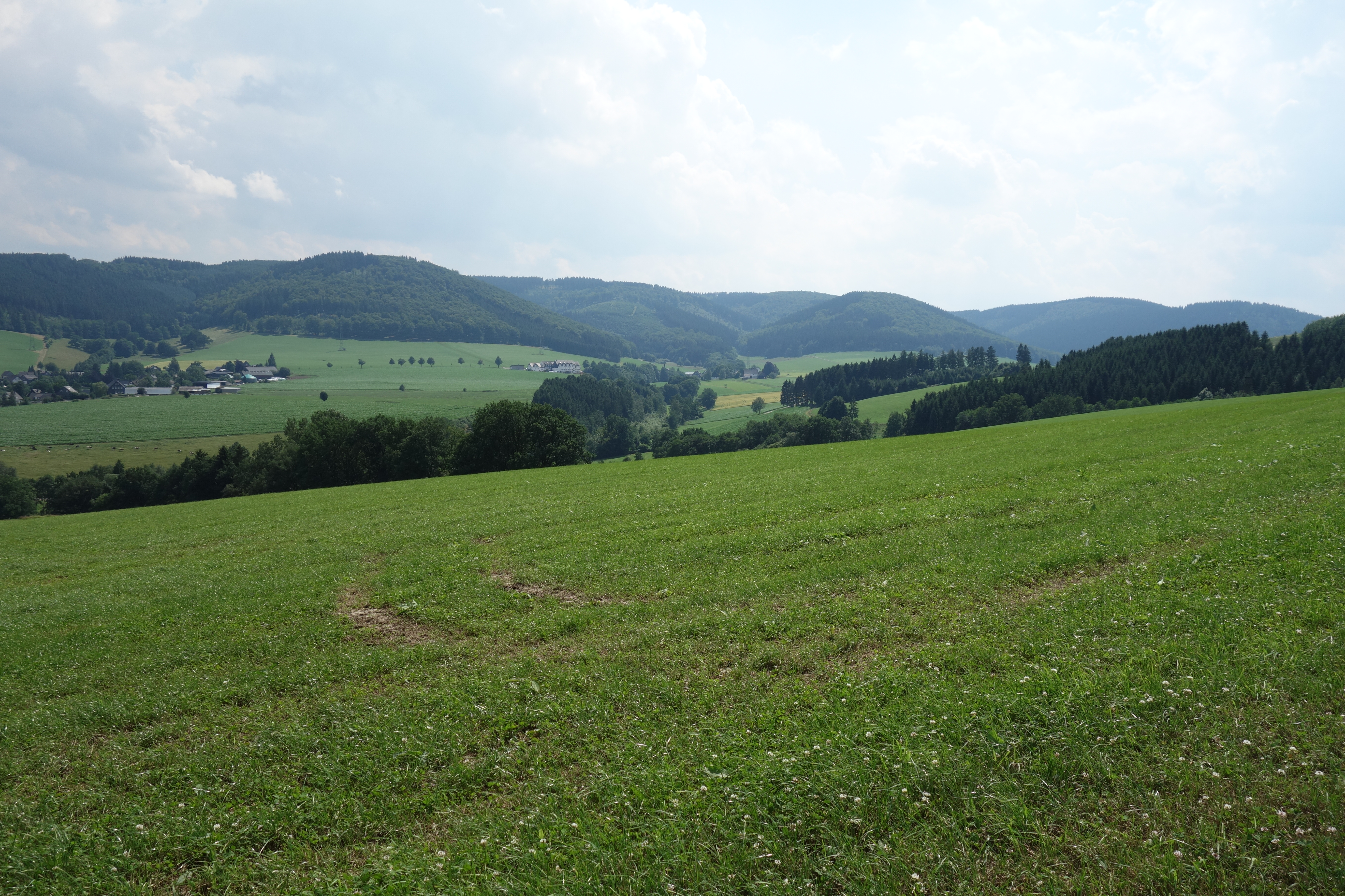 Landschaftsschutzgebiet Bödefelder Mulde im Stadtgebiet Schmallenberg, Wald im Hintergrund gehört zum Landschaftsschutzgebiet Schmallenberg. Blick von Nordosten; Häuser Links von Walbecke und in Mitte Gasthof Wüllner, Altenfeld.